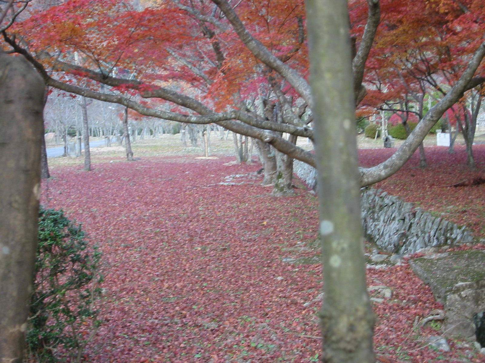 神戸 千苅貯水場 外側から撮影